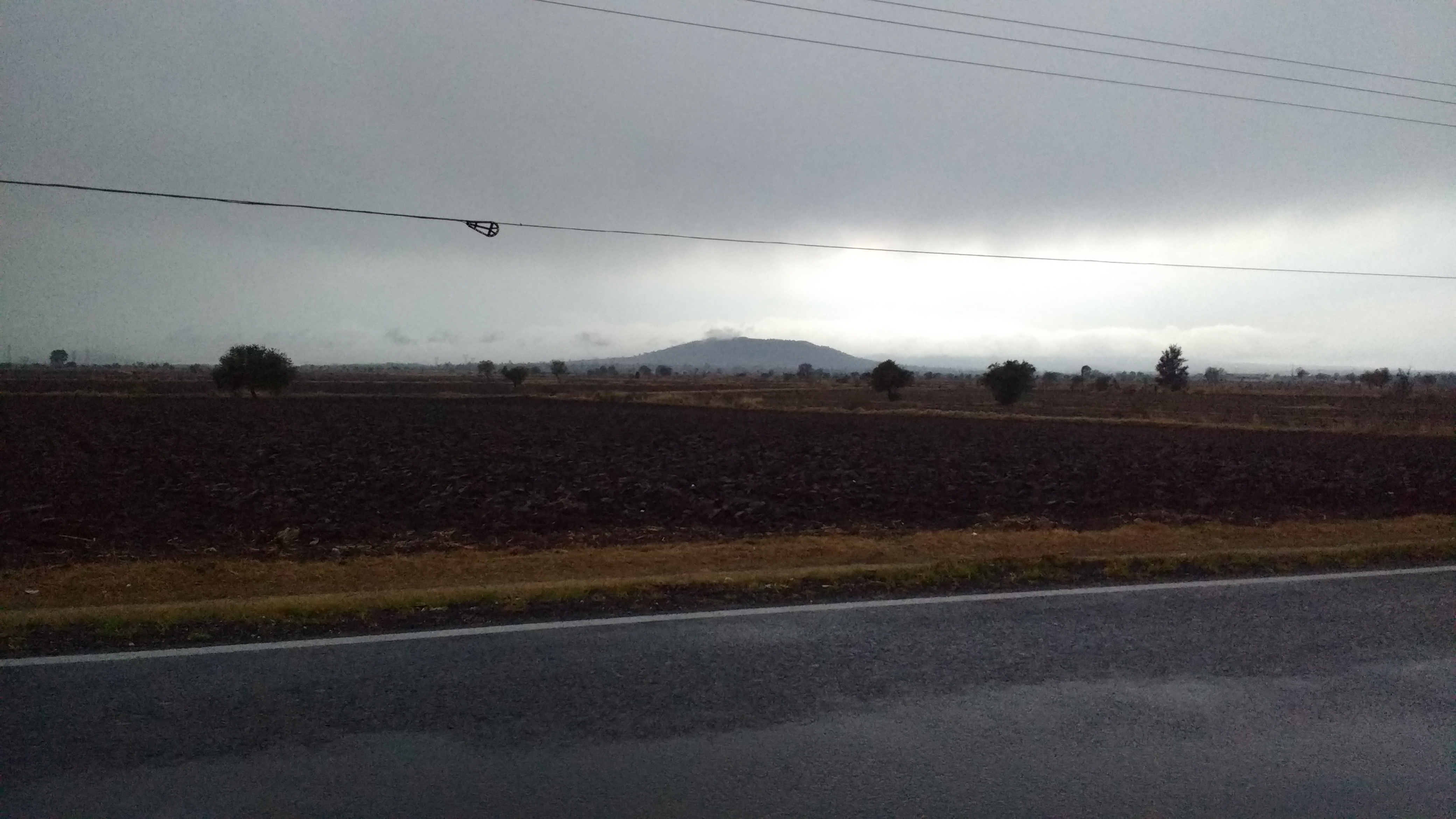 Foto tomada en las afueras del pueblo de Calpulalpan en 2017